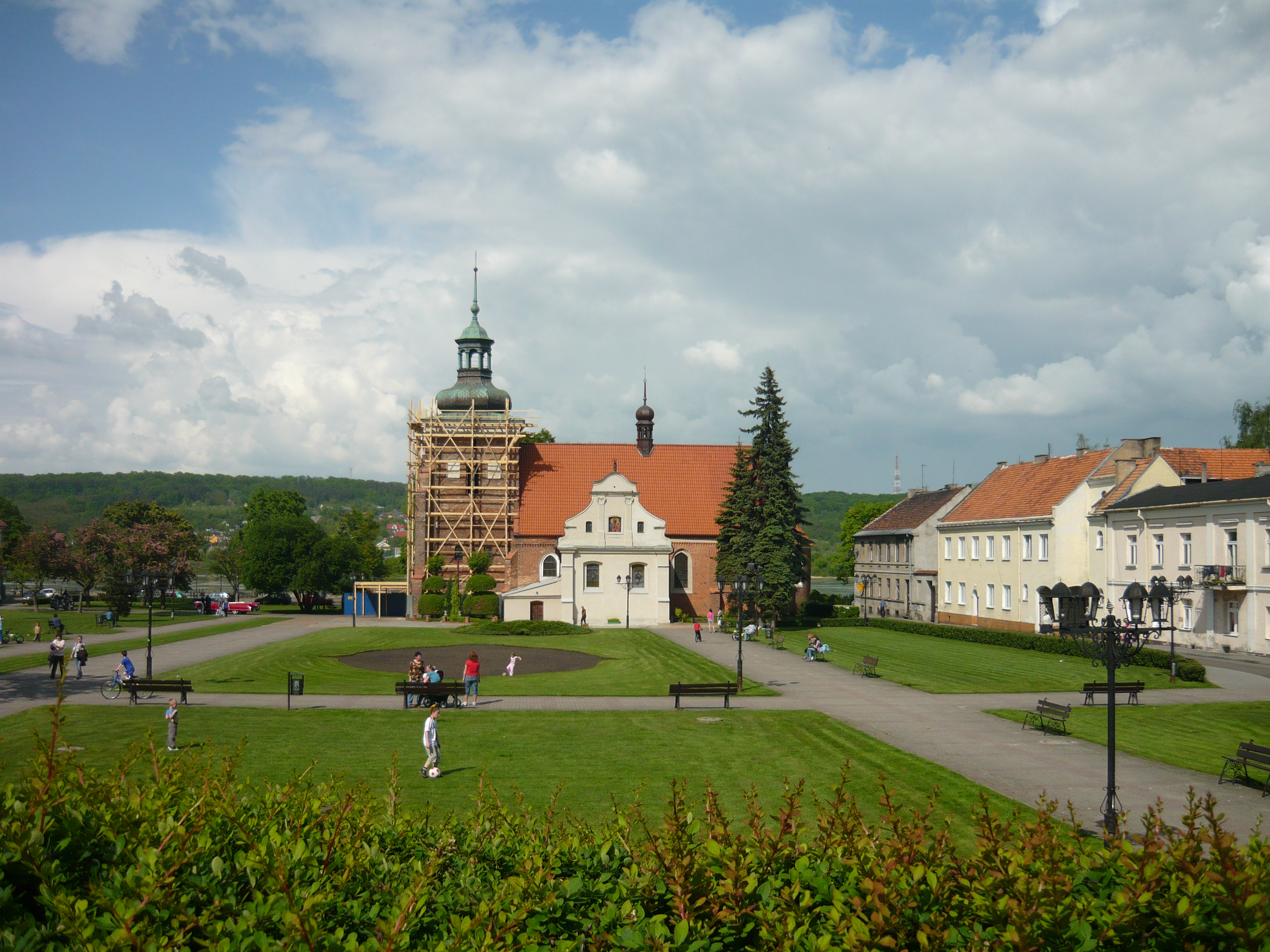 Widok na Kościół pw. Świętego Jana Chrzciciela we Włocławku, 20 maja 2010 roku.